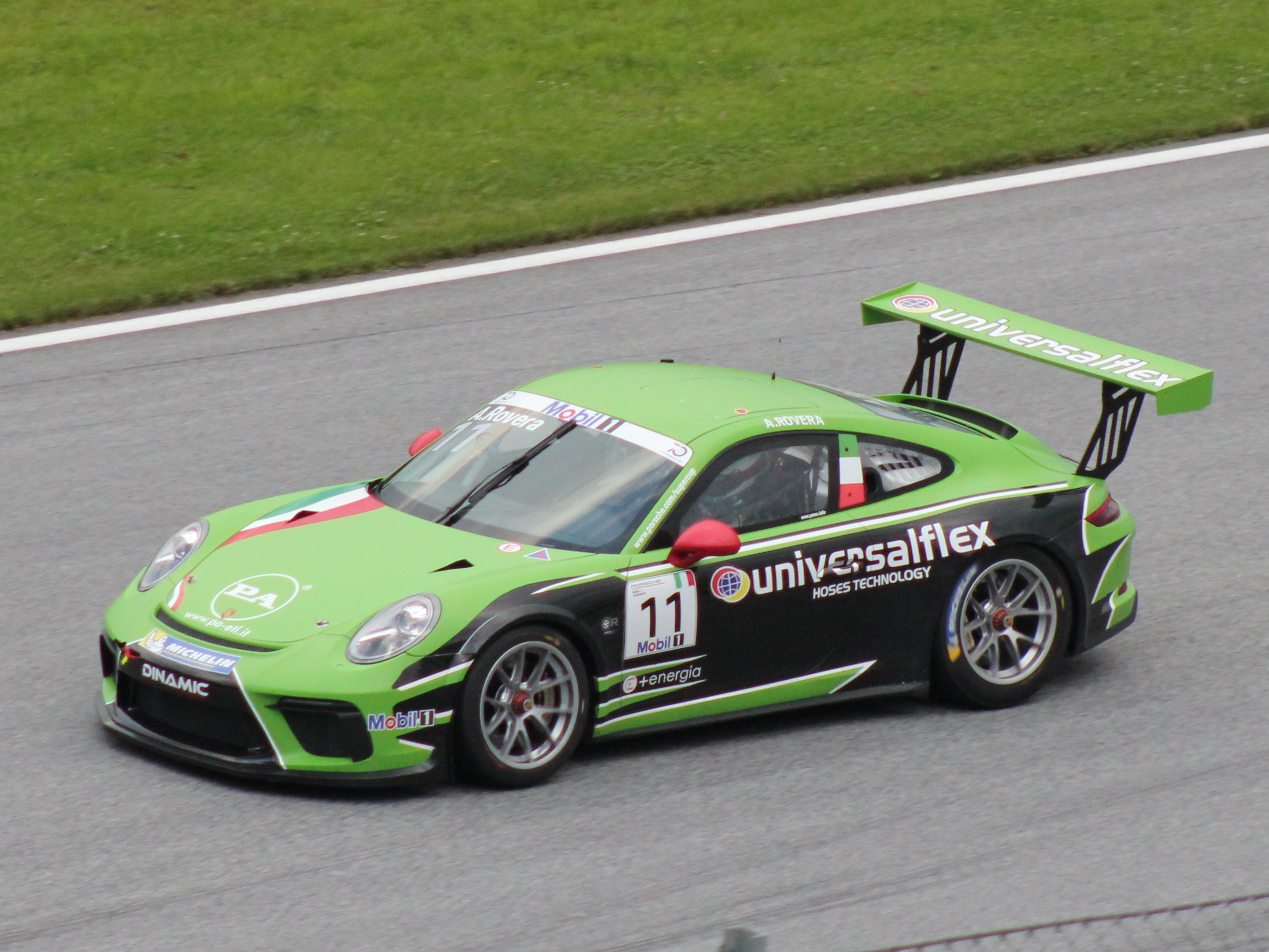 11 Alessio Rovera beim Rennwochenende in Österreich 2018